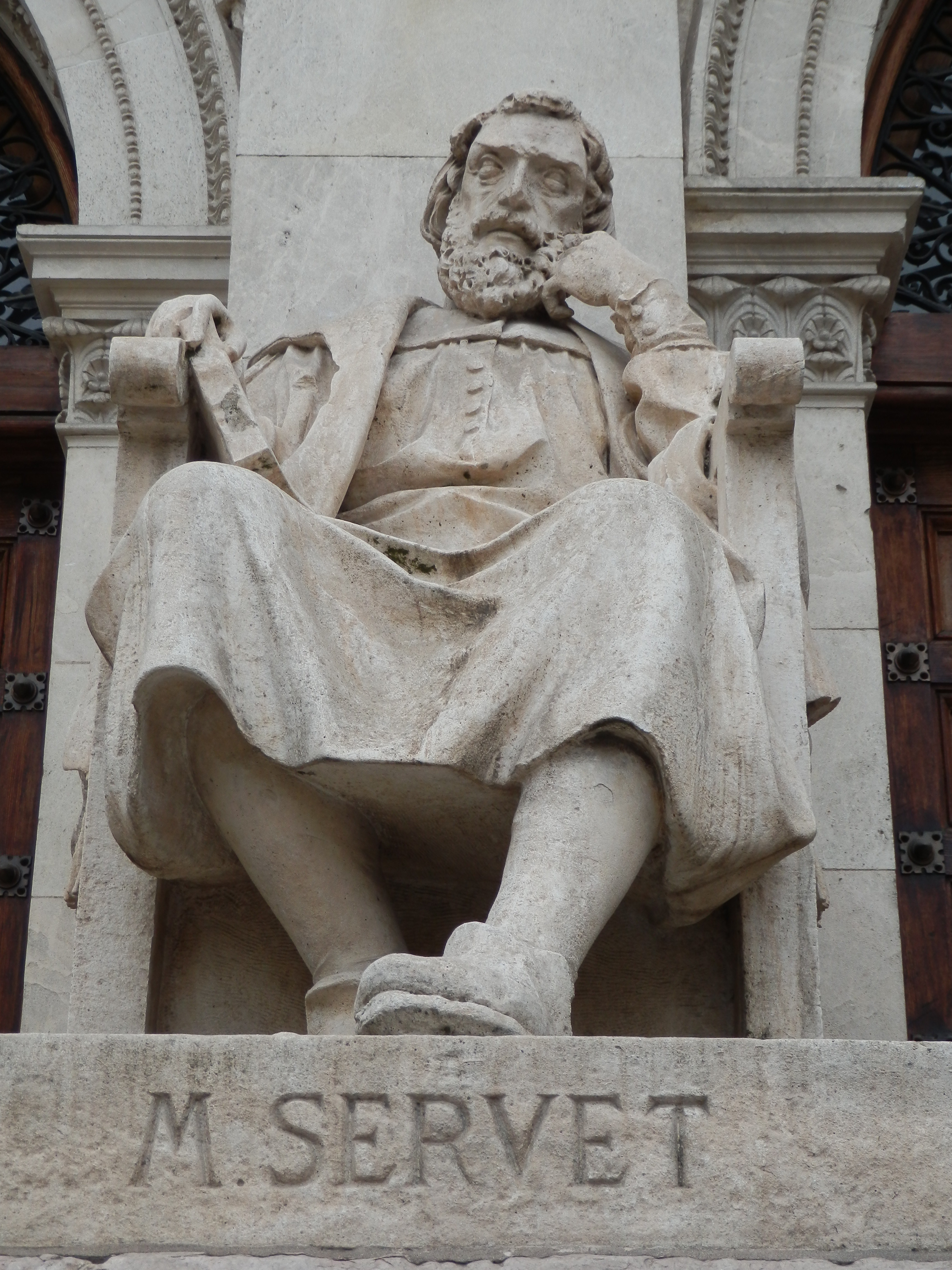 Estatua dedicada a Miguel Servet en el Paraninfo de la Universidad de Zaragoza (Antigua Facultad de Medicina).